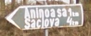 Reci Covasna